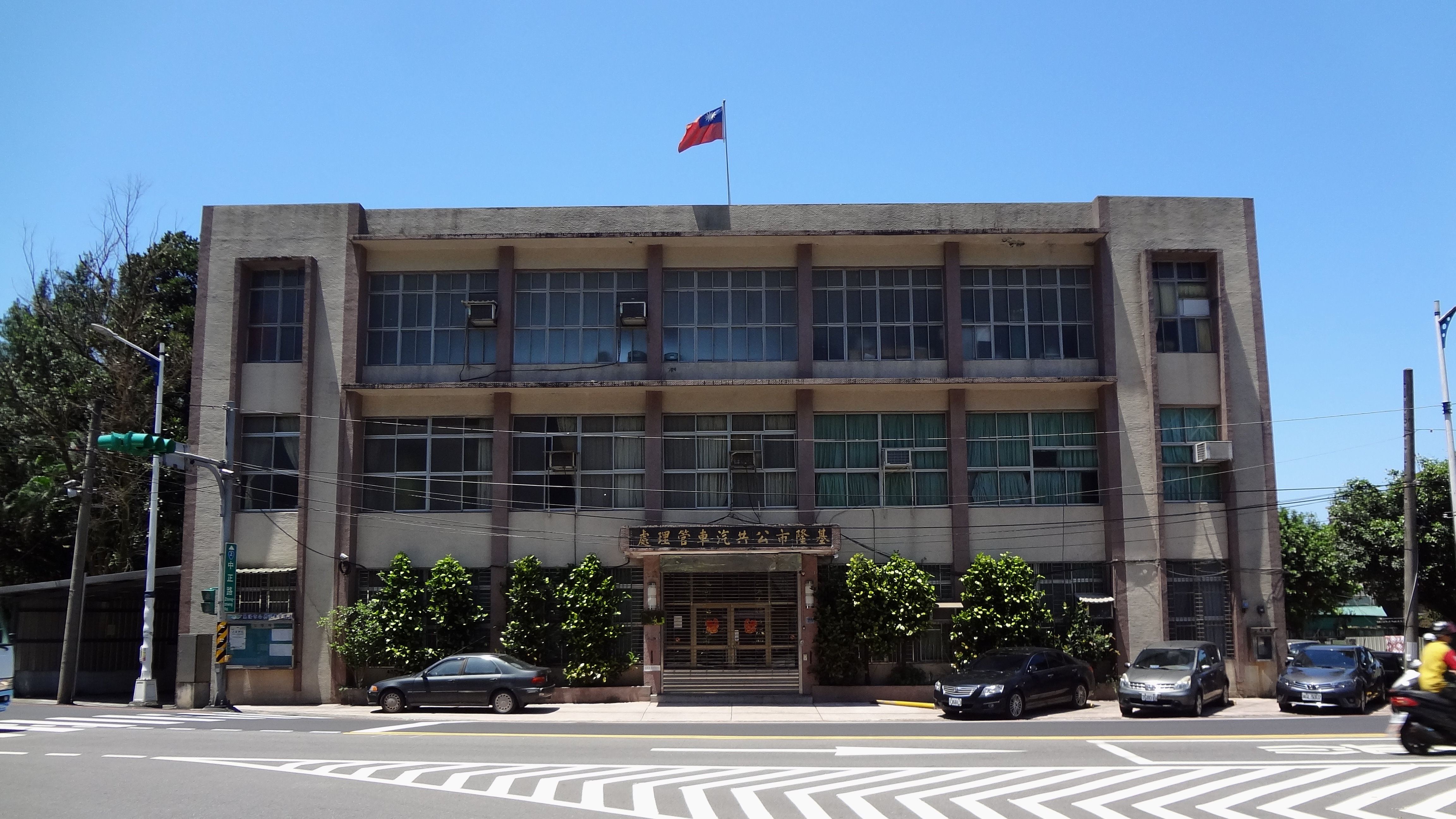 基隆市公共汽車管理處，位於基隆市中正區中正路103號。